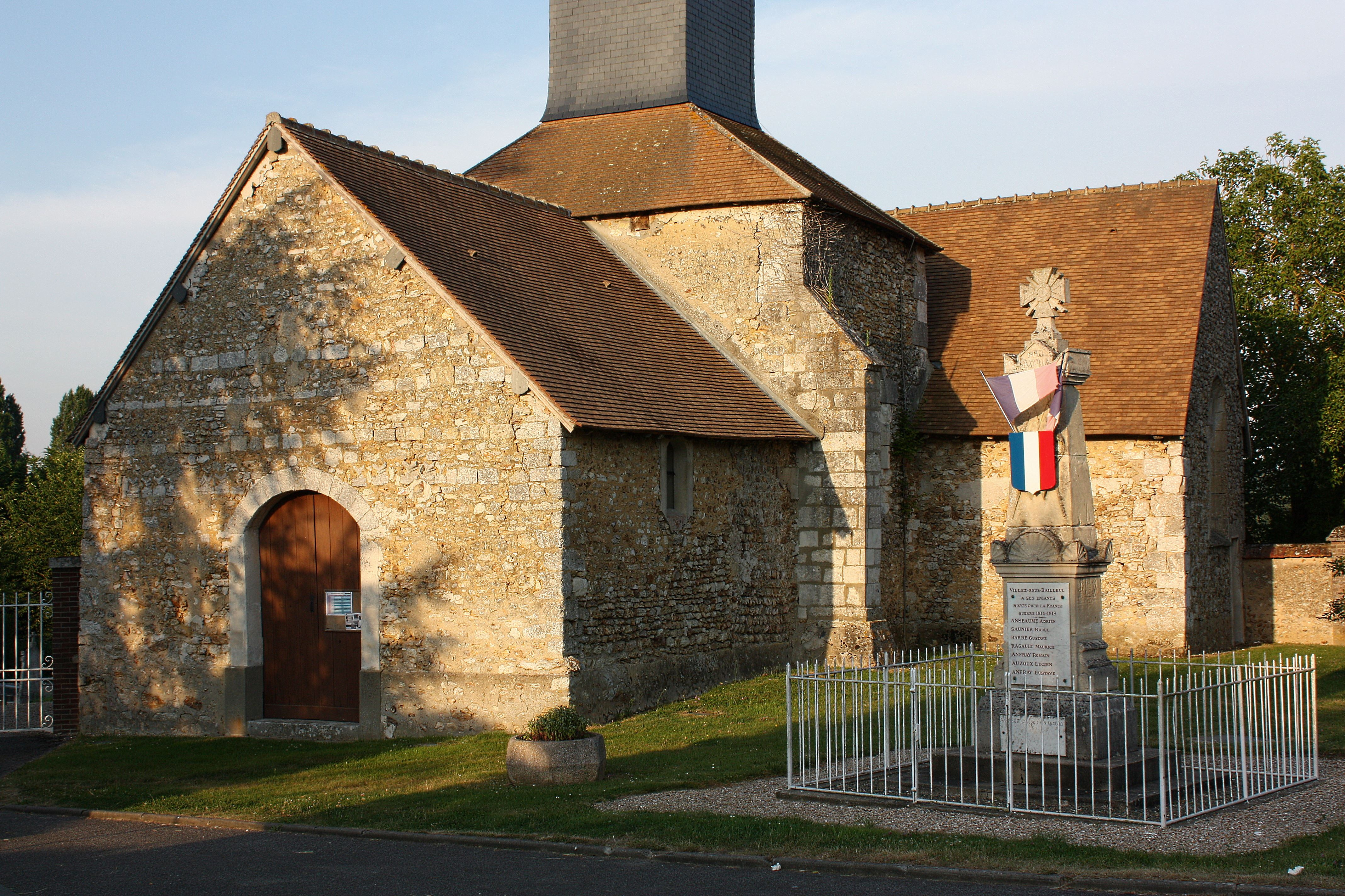 Villez-sous-Bailleul - Eglise Saint-Philibert Vue générale au Sud-Ouest